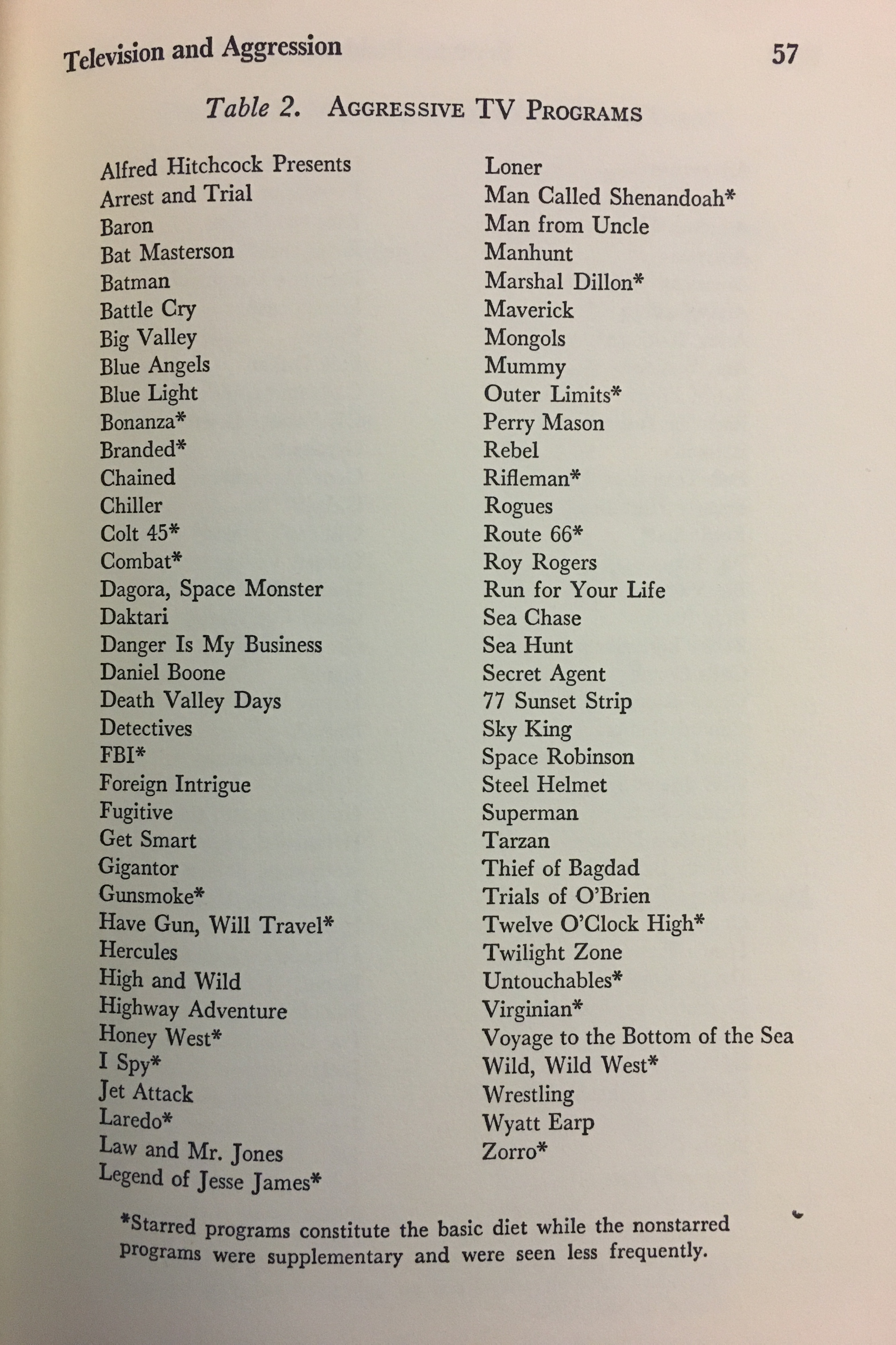 Список жестоких фильмов, используемых в исследовании 1971 года ("Телевидение и агрессия")